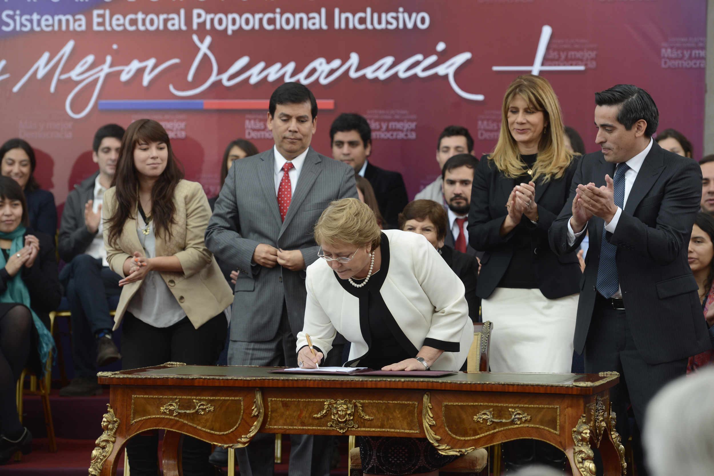 Ceremonia de Promulgación de Ley de Sistema Electoral Proporcional Inclusivo.